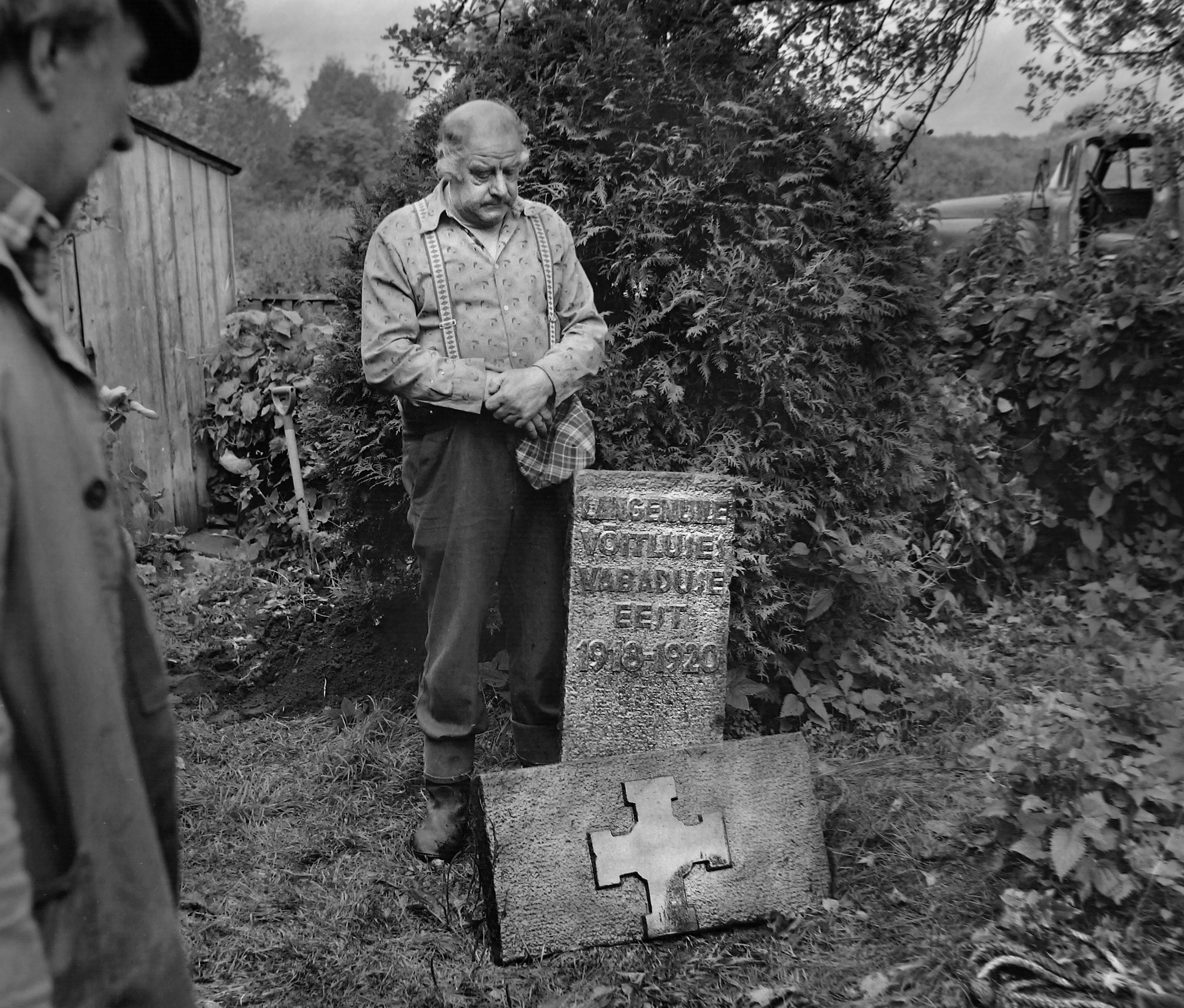 40 aastat elupuu all peidikus olnud vabadussamba 2 graniittahvlit kaevas (28.08.1988)oma koduõuel välja Johannes Kõllamaa